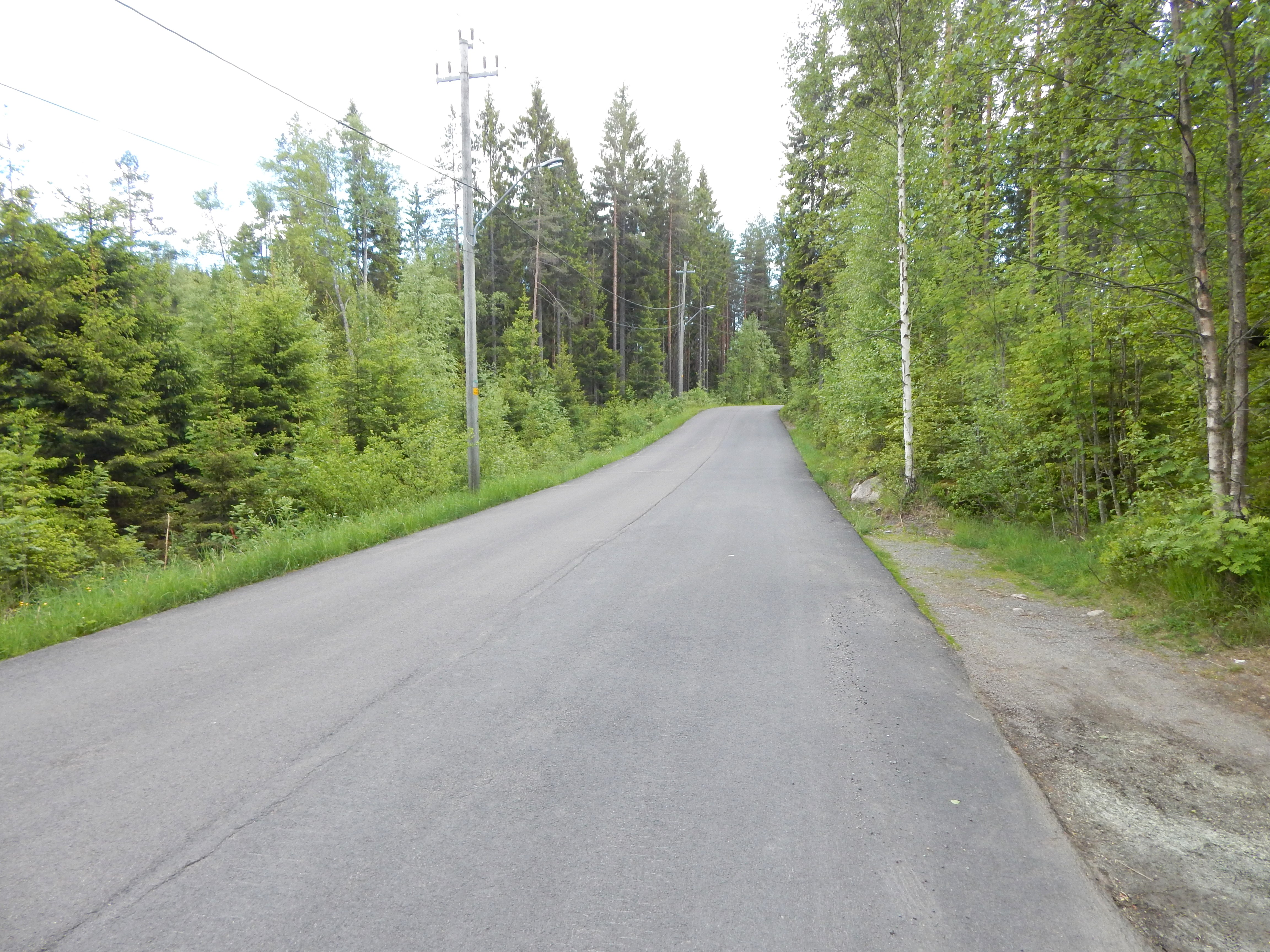 Greveveien